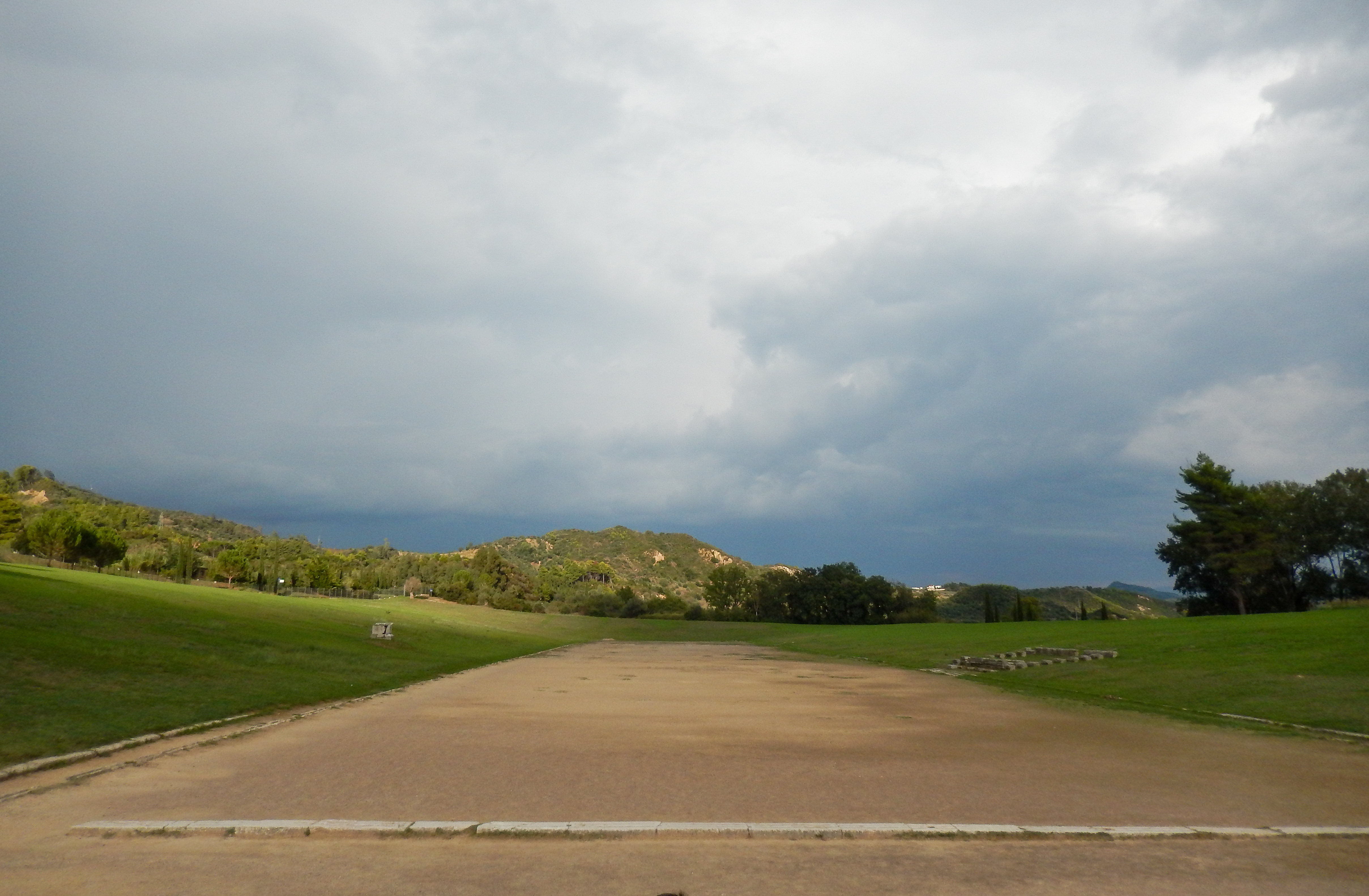 Stadion im antiken Olympia, Griechenland.